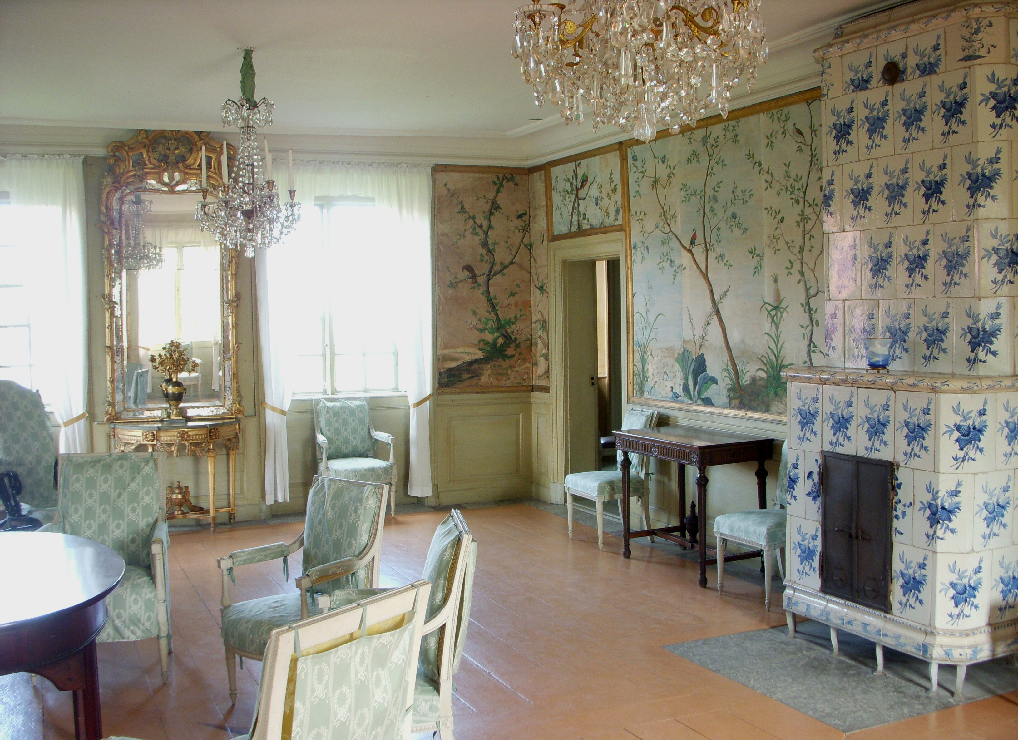 Rokoko-gården Svindersvik i Nacka, salongen